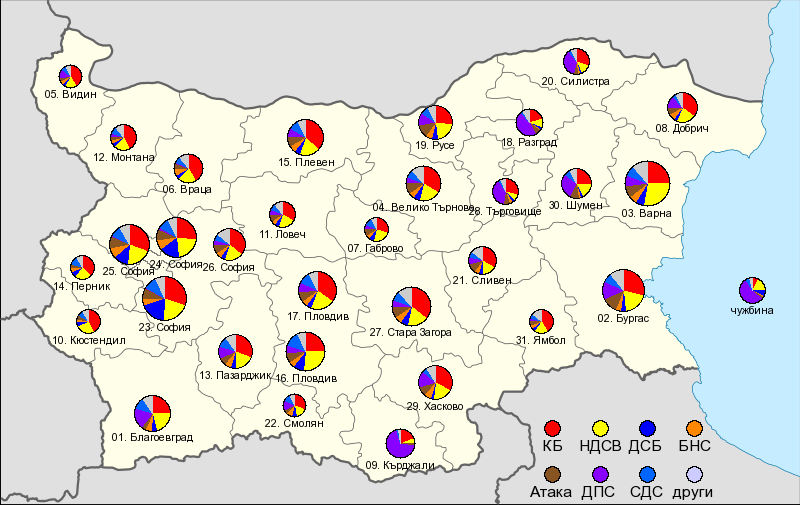 Парламентарни избори в България през 2005: подадени гласове по район